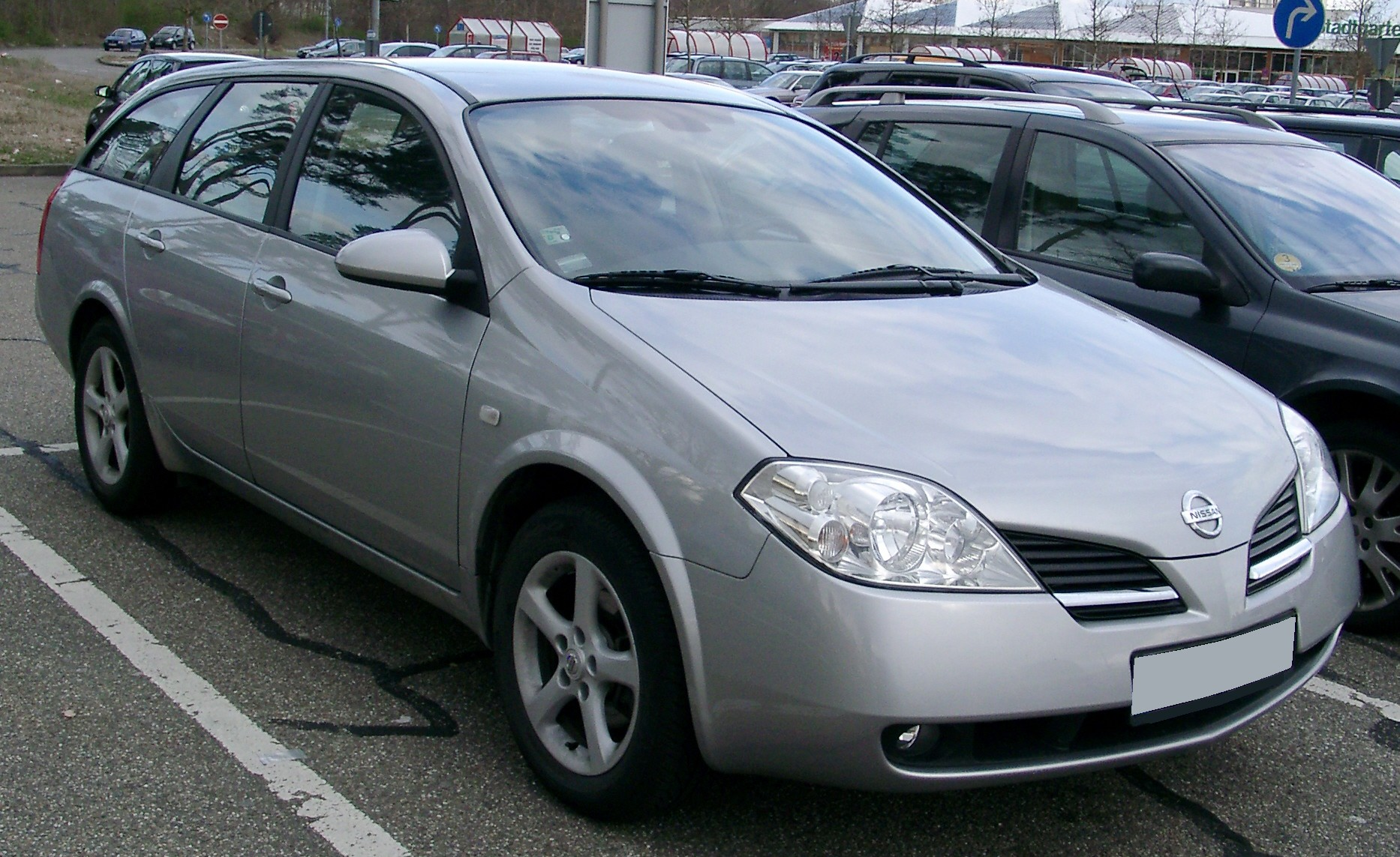 Nissan Primera P12 Traveller